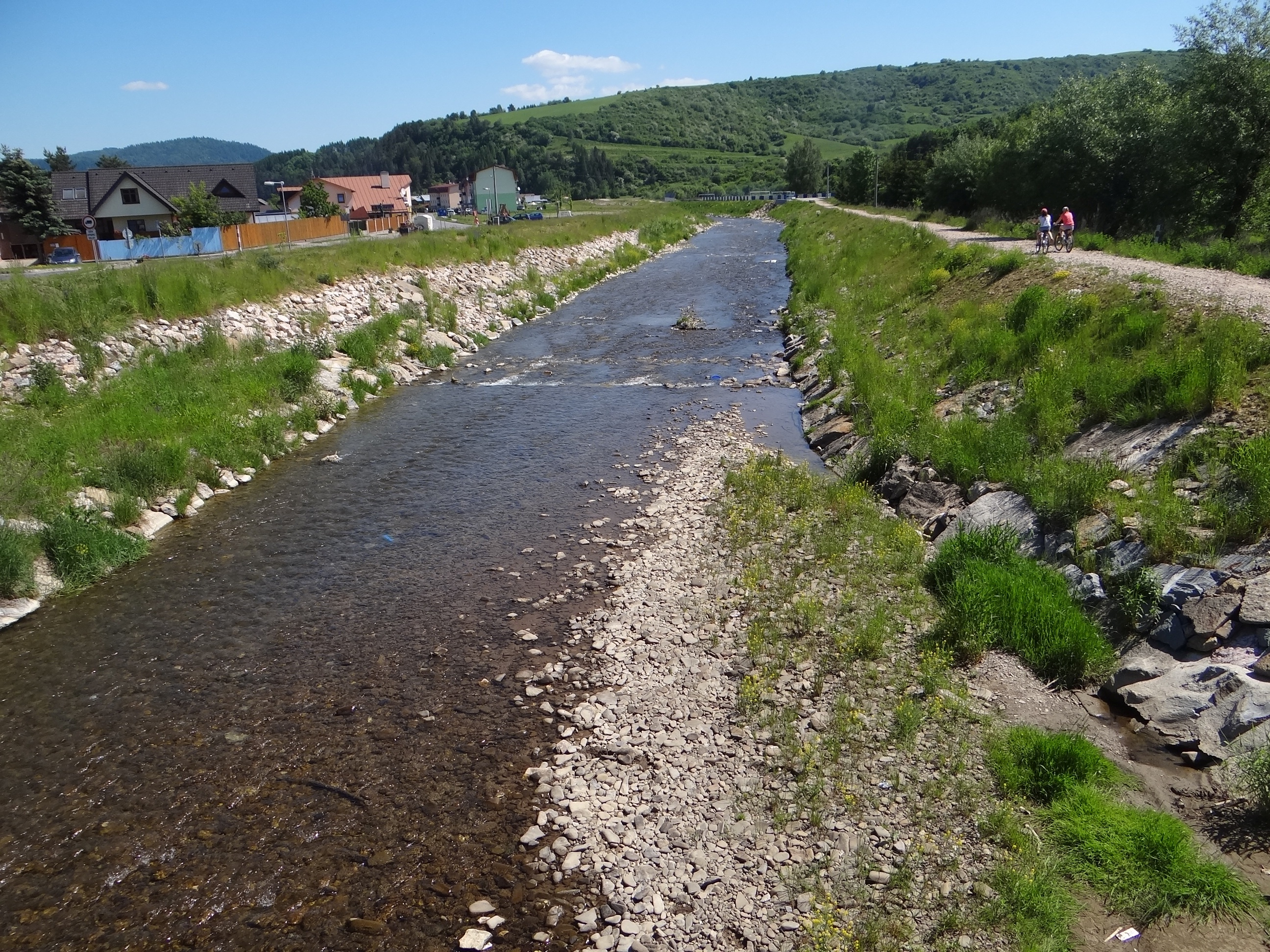 Jakubianka on Nová Ľubovňa